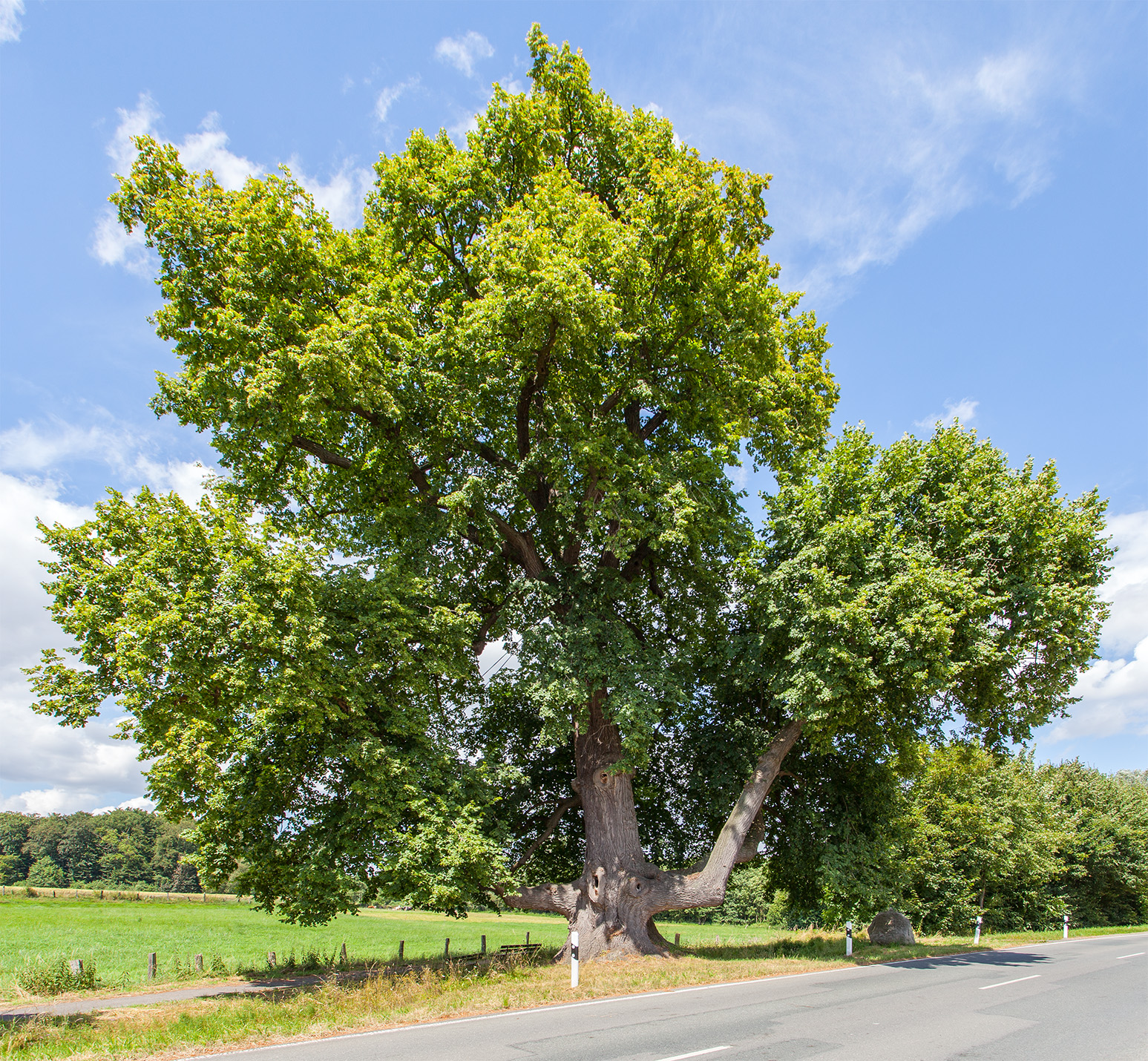 Die Tanzlinde in Bexten (Bad Salzuflen), Kreis Lippe, Nordrhein-Westfalen